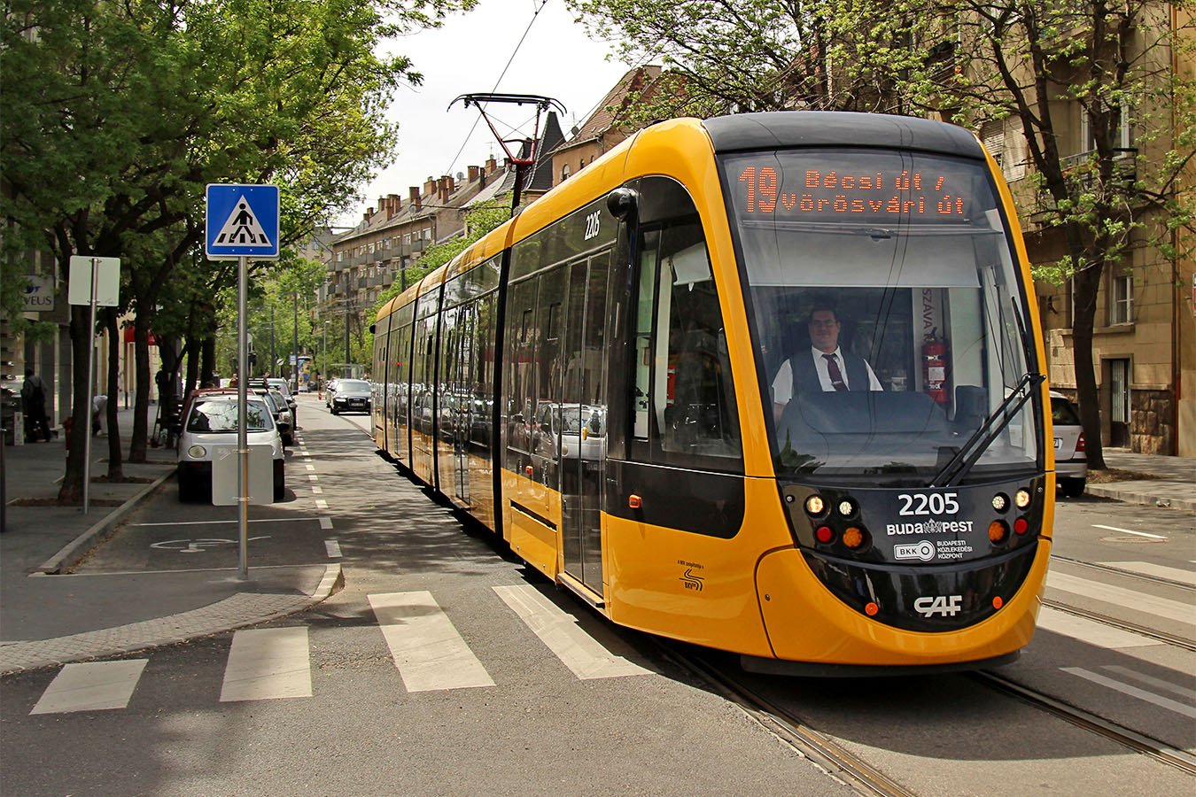 CAF Urbos 3 a 19-es villamos vonalán 2016-ban